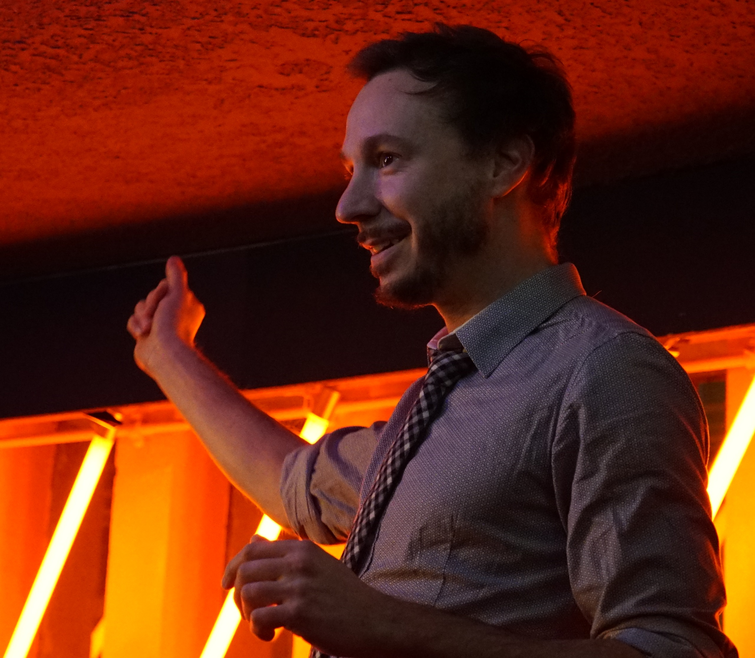 lors d'un concert à Reims.